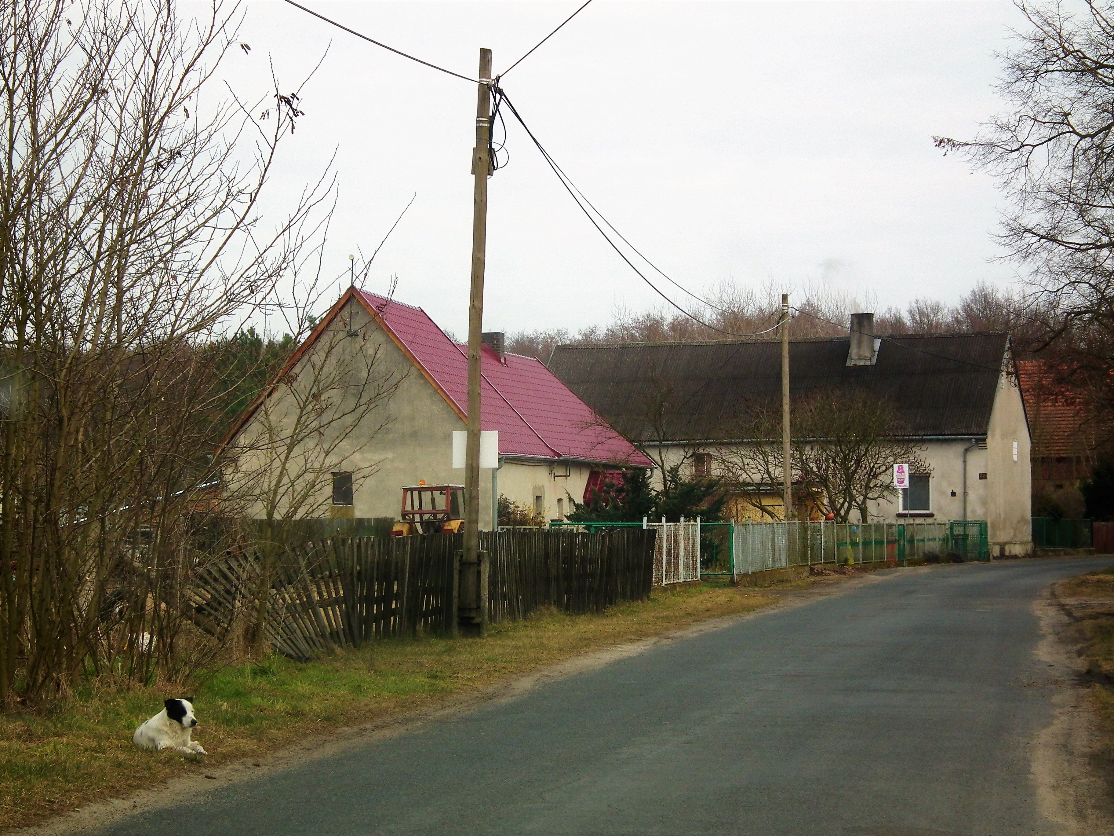 Lechitów - wieś.